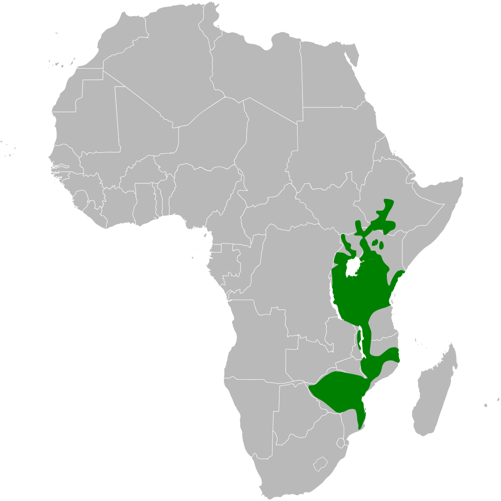 Sylvietta whytii distribution map, based on